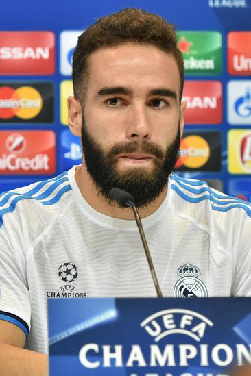 Реал - Шахтер. Накануне